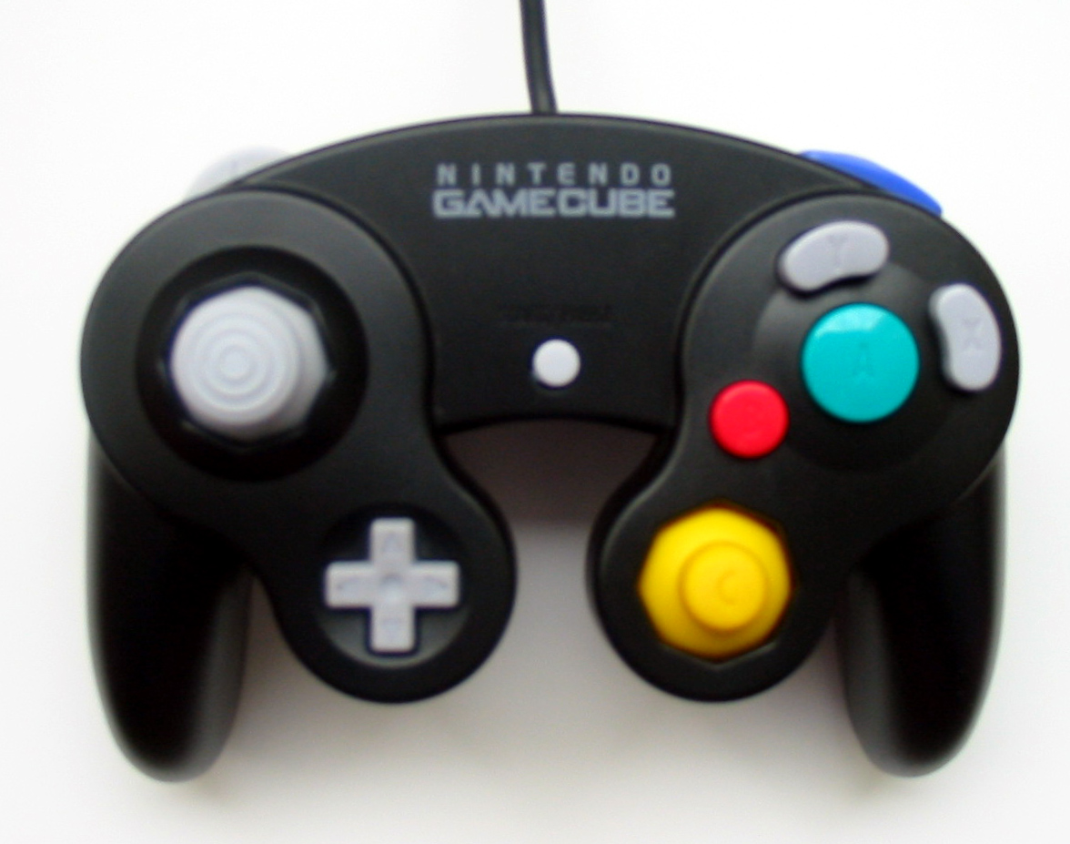 Nintendo GameCube Silver Controller